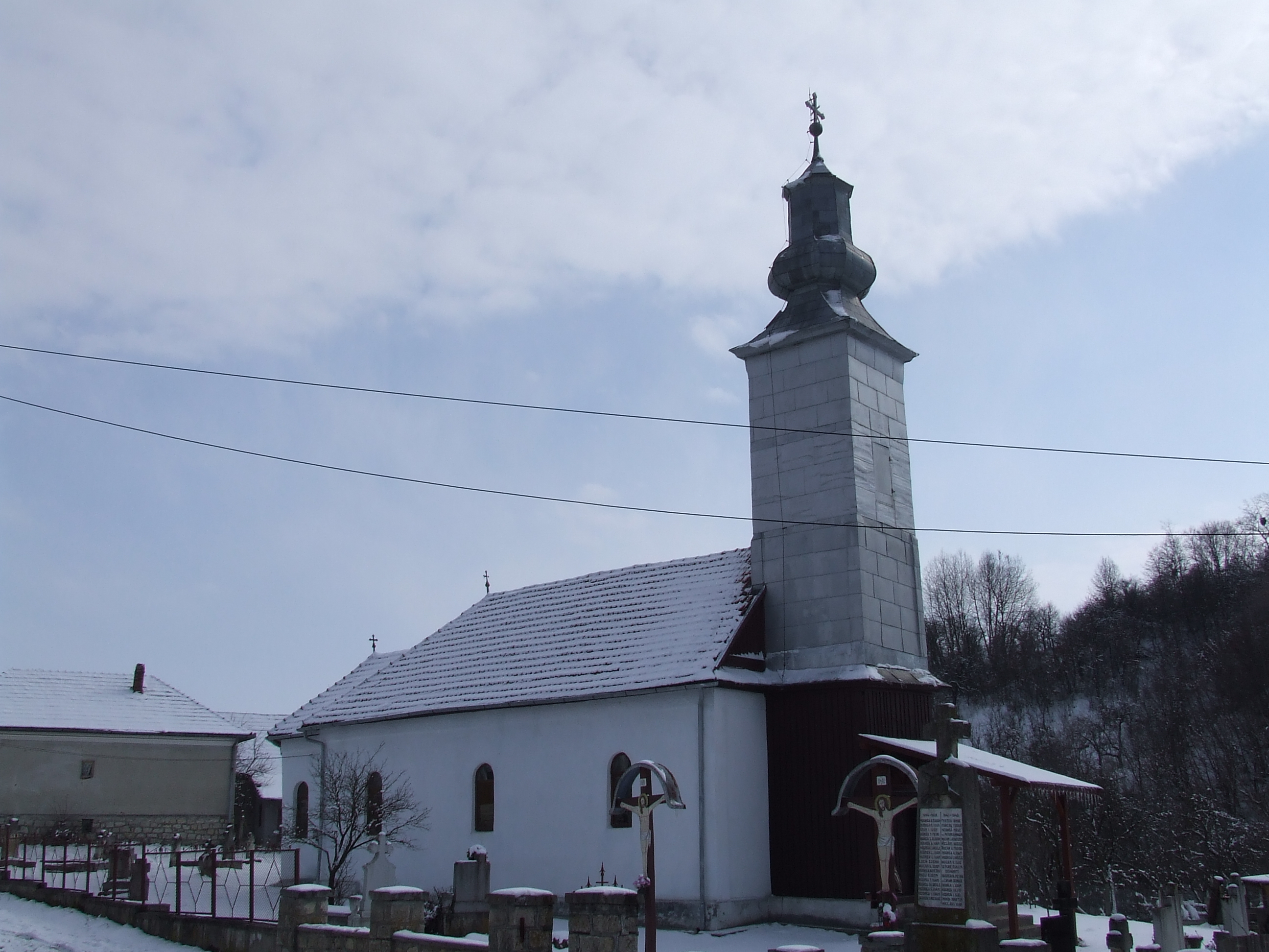 Biserica de lemn din Vălişoara, judeţul Cluj.